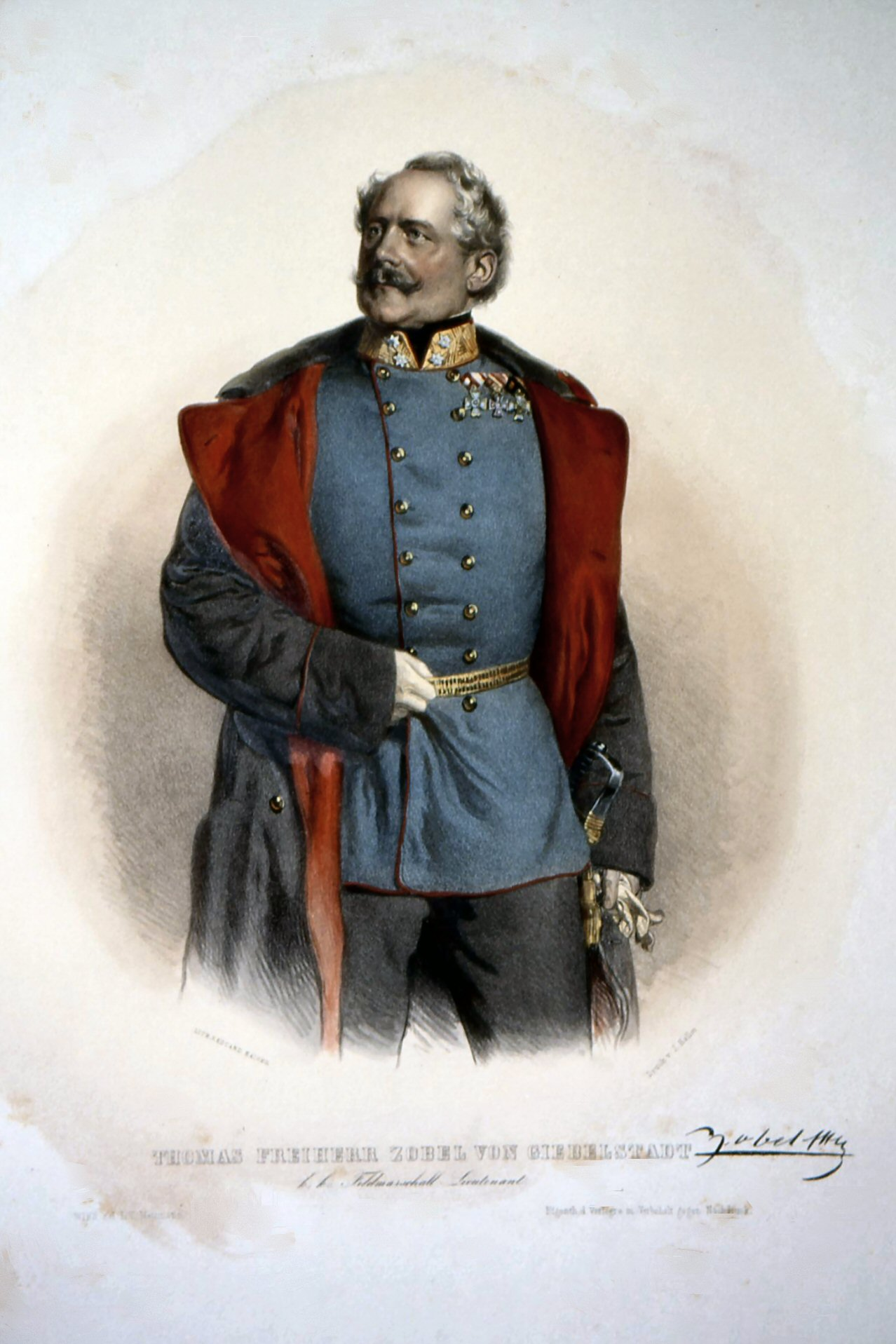 Thomas Friedrich Freiherr von Zobel-Giebelstadt (1799-1869), k. k. Feldmarschallleutnant, Ritter des Militärischen Maria-Theresien-Ordens.Lithographie von Eduard Kaiser, um 1855.